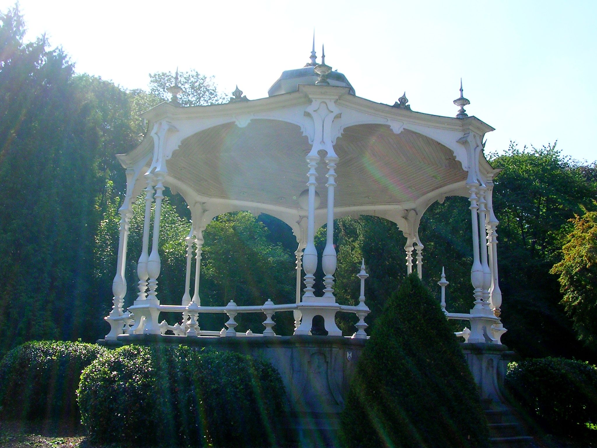 Kiosque situé dans le parc de la Société Royale d'Harmonie